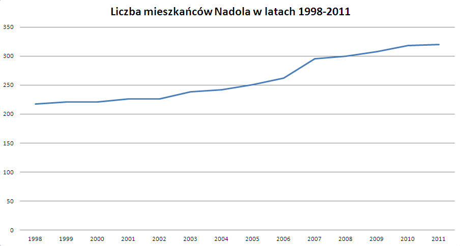 Wykres liczby mieszkańców Nadola w latach 1998-2011. Na podstawie danych z UG Gniewino